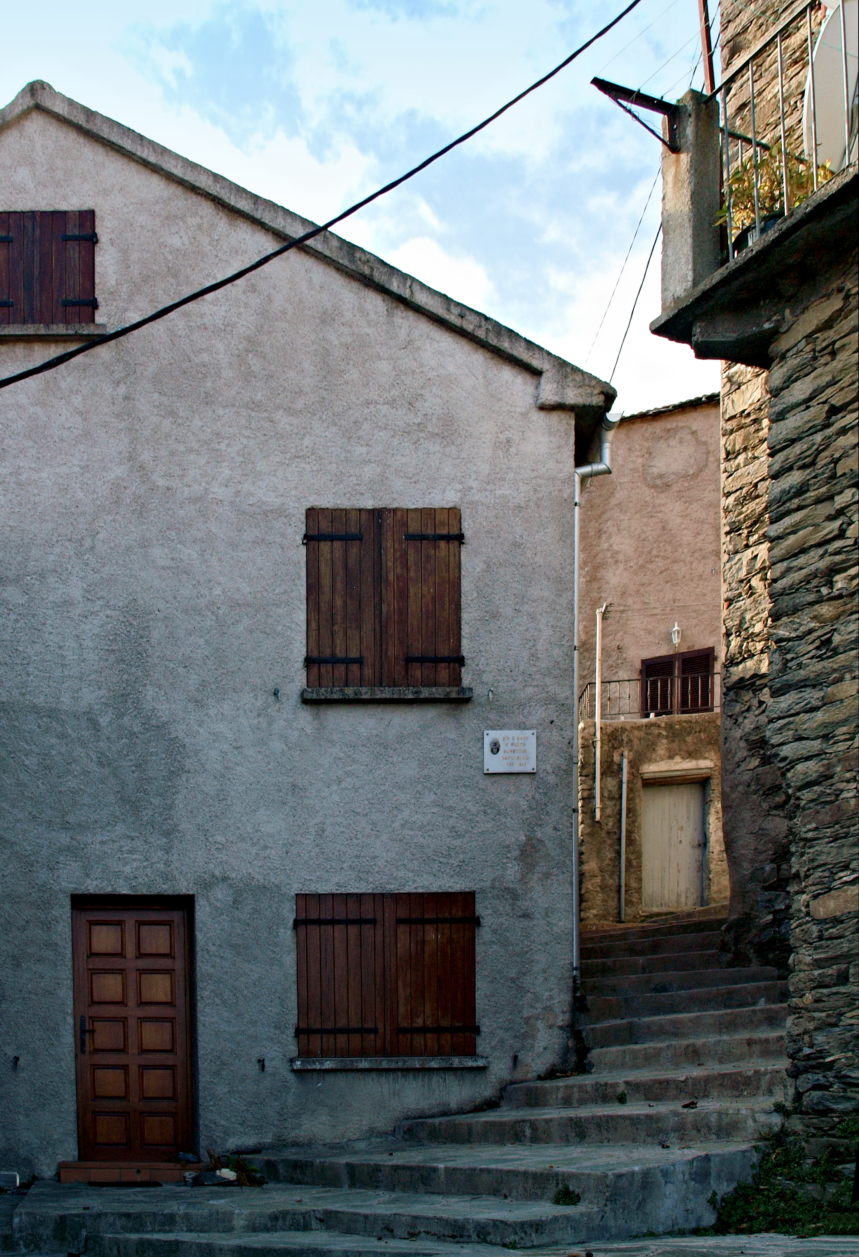 Rusio, Castagniccia (Corse) - Maison du poète Natalellu Sarocchi